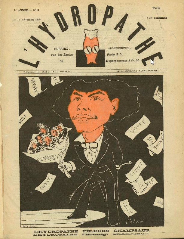 L'Hydropathe, n°3 du 10 février 1879. Félicien Champsaur caricature de Cabriol (Georges Lorin). Numérisation sur le site Gallica.